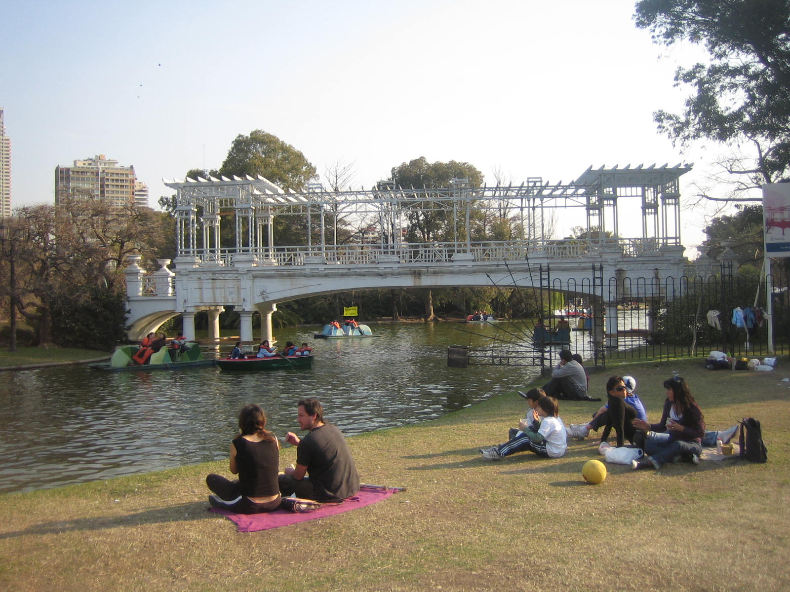 El Rosedal, Buenos Aires, Argentina